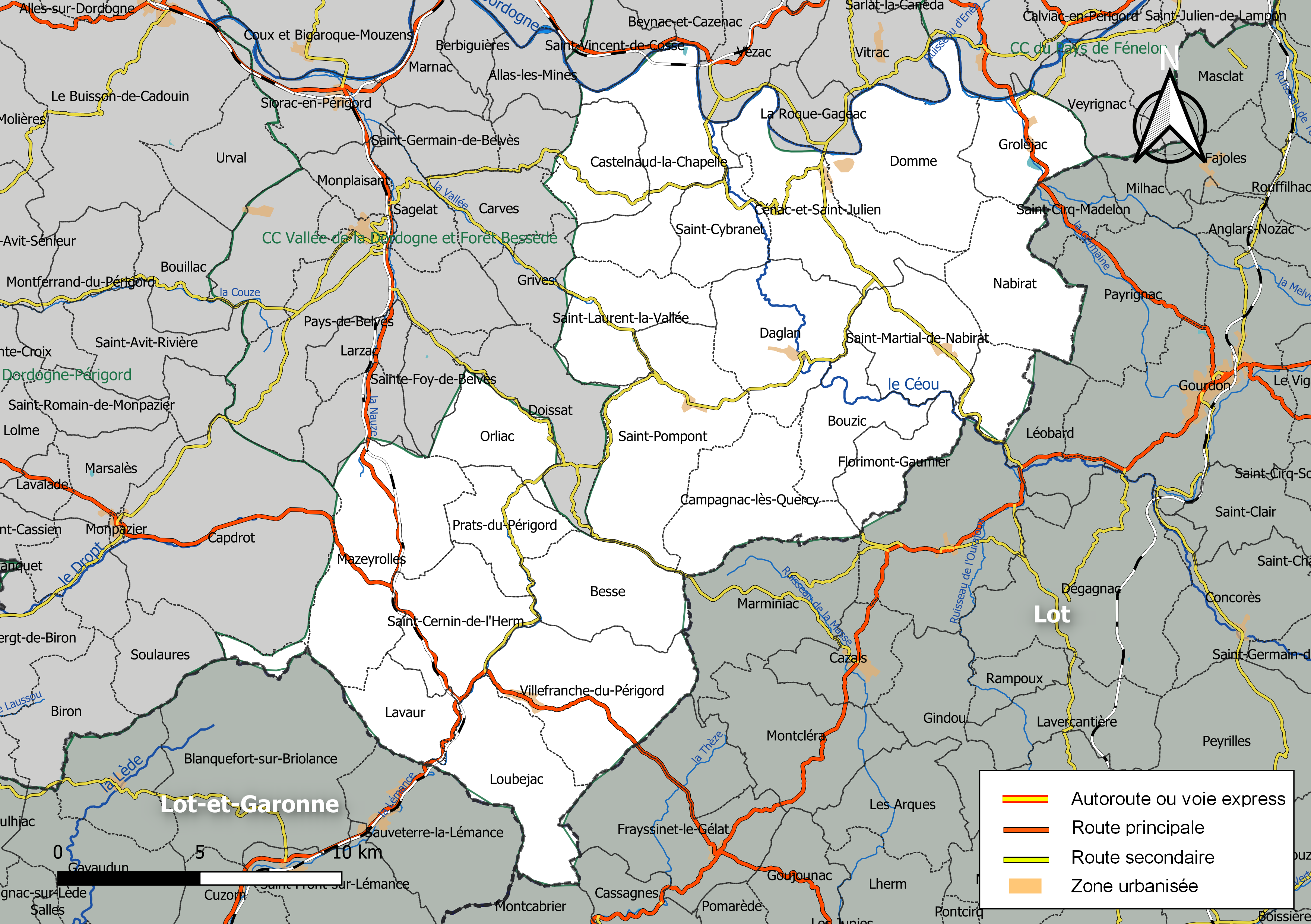 Carte géographique de la Communauté de communes de Domme-Villefranche du Périgord, département de la Dordogne, France. Composition au 1er janvier 2019.